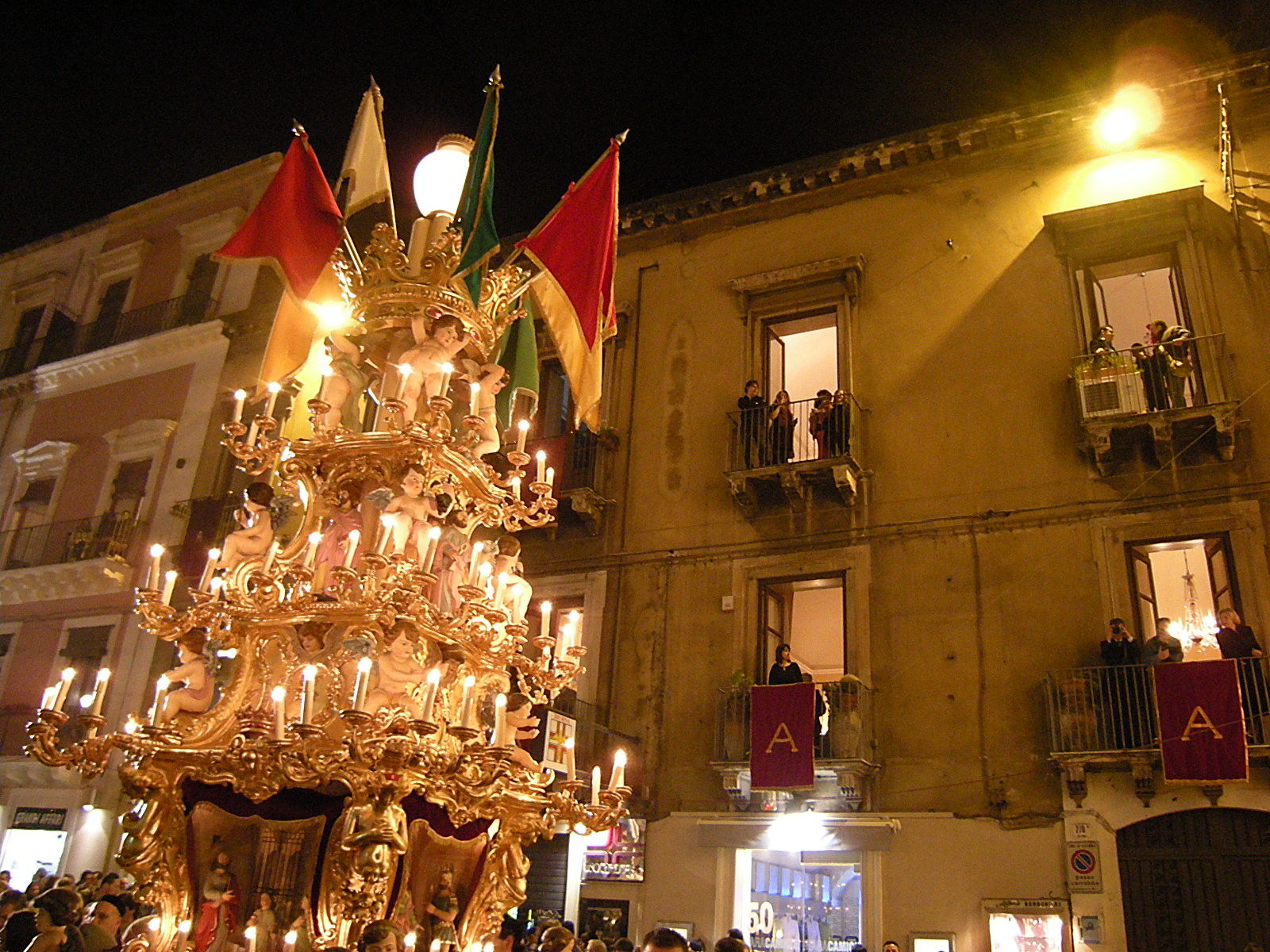 Os 'cadelore' (ou cannalori) são construções em madeira ricamente esculpidas e pintadas de dourado, geralmente seguindo o estilo barroco siciliano.